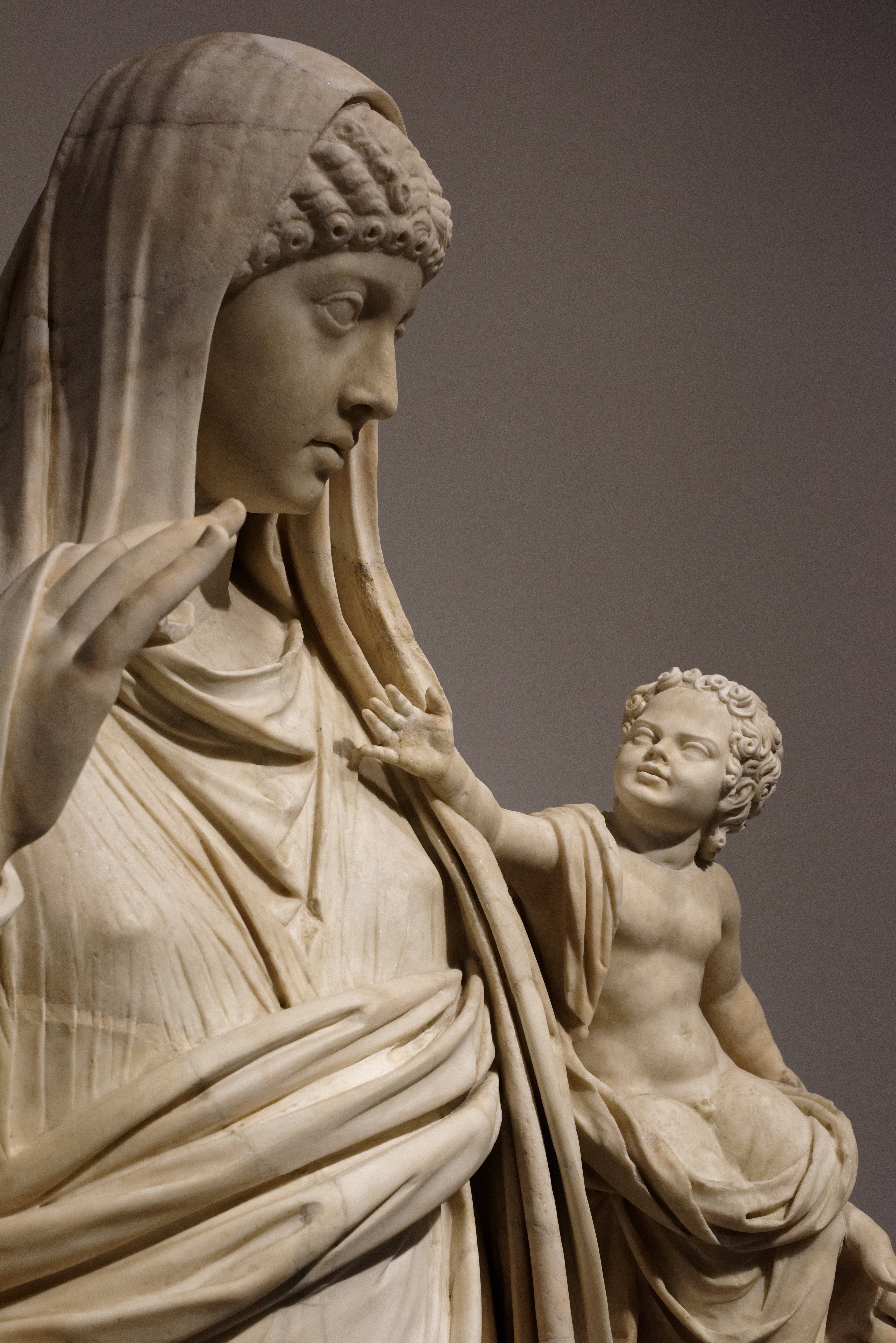 Messaline et Britannicus - Vers 50 ap. J.-C; Paris, Musée du Louvre, département des Antiquités grecques, etrusques et romaines, MA 1224 - MR 280